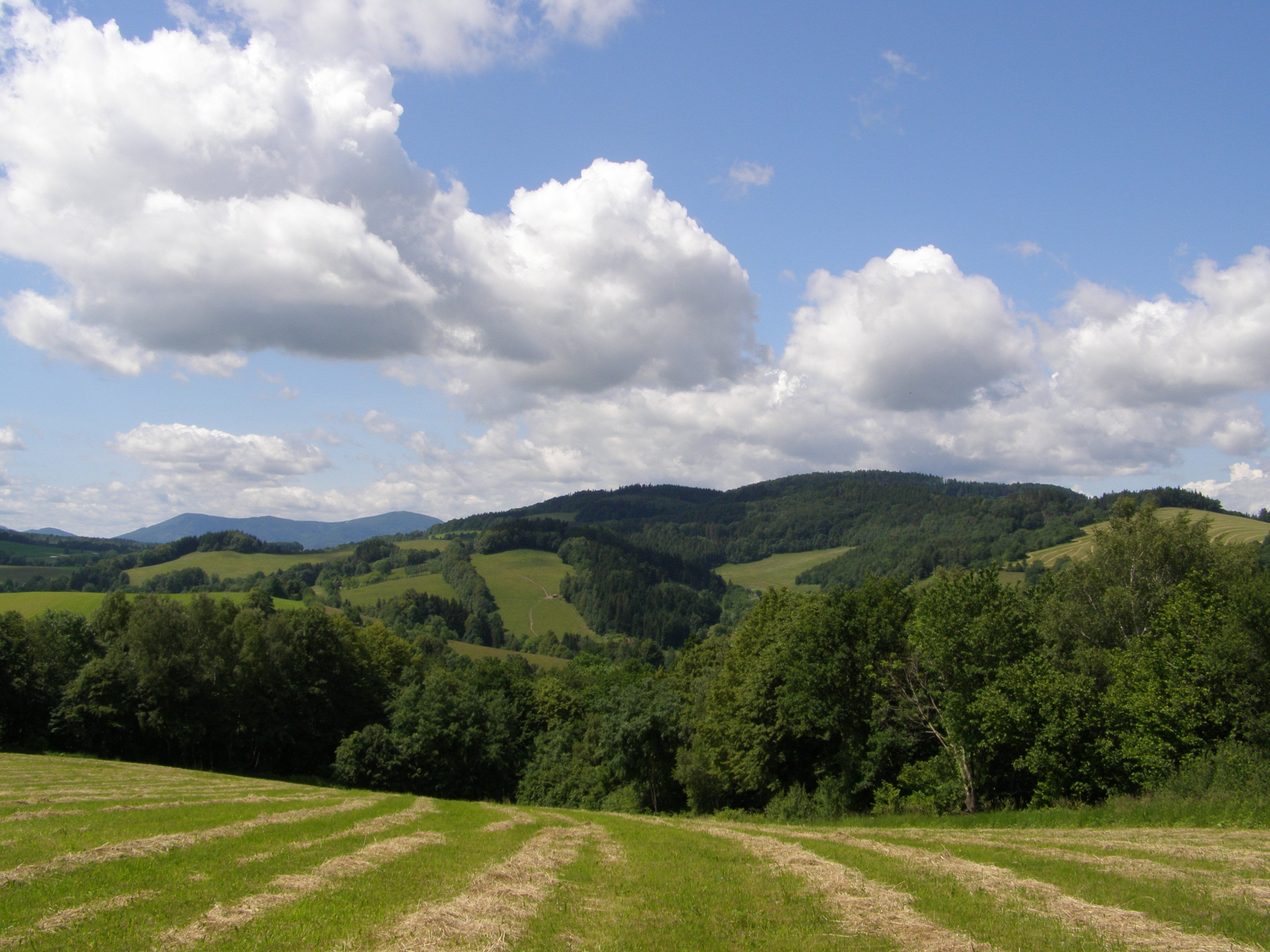 Metylovická pahorkatina, západní část, v pozadí vlevo Veřovické vrchy